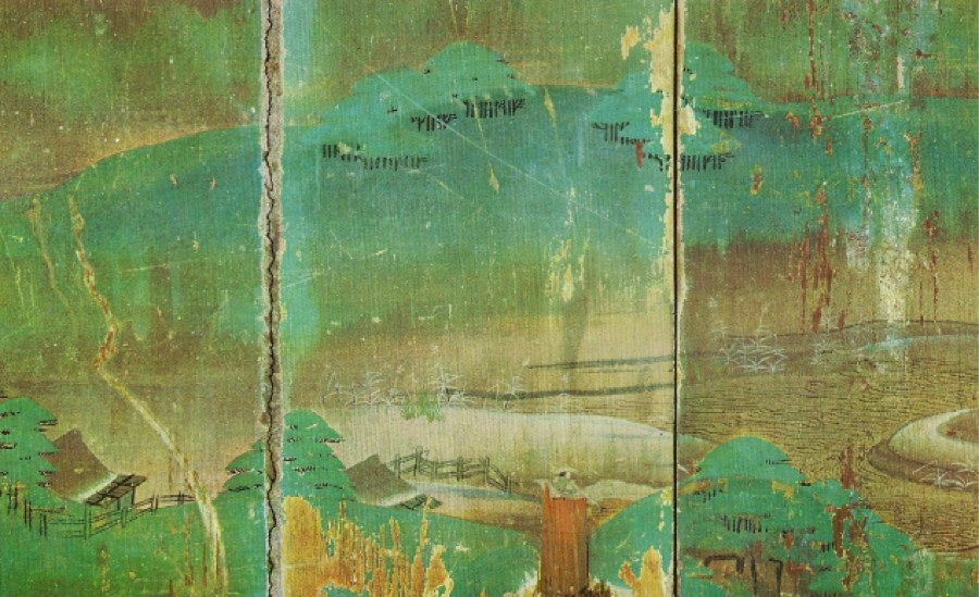 Porte nord du Pavillon du Phénix - Paysage au début du printemps, détail de la porte nord du Pavillon du Phénix (Hōō-dō) - 1053. Peinture anonyme sur panneau de bois - (dimensions du panneau en centimètres: 374,5x138,6). Conservée au Byōdō-in de Nara (près de Kyoto).